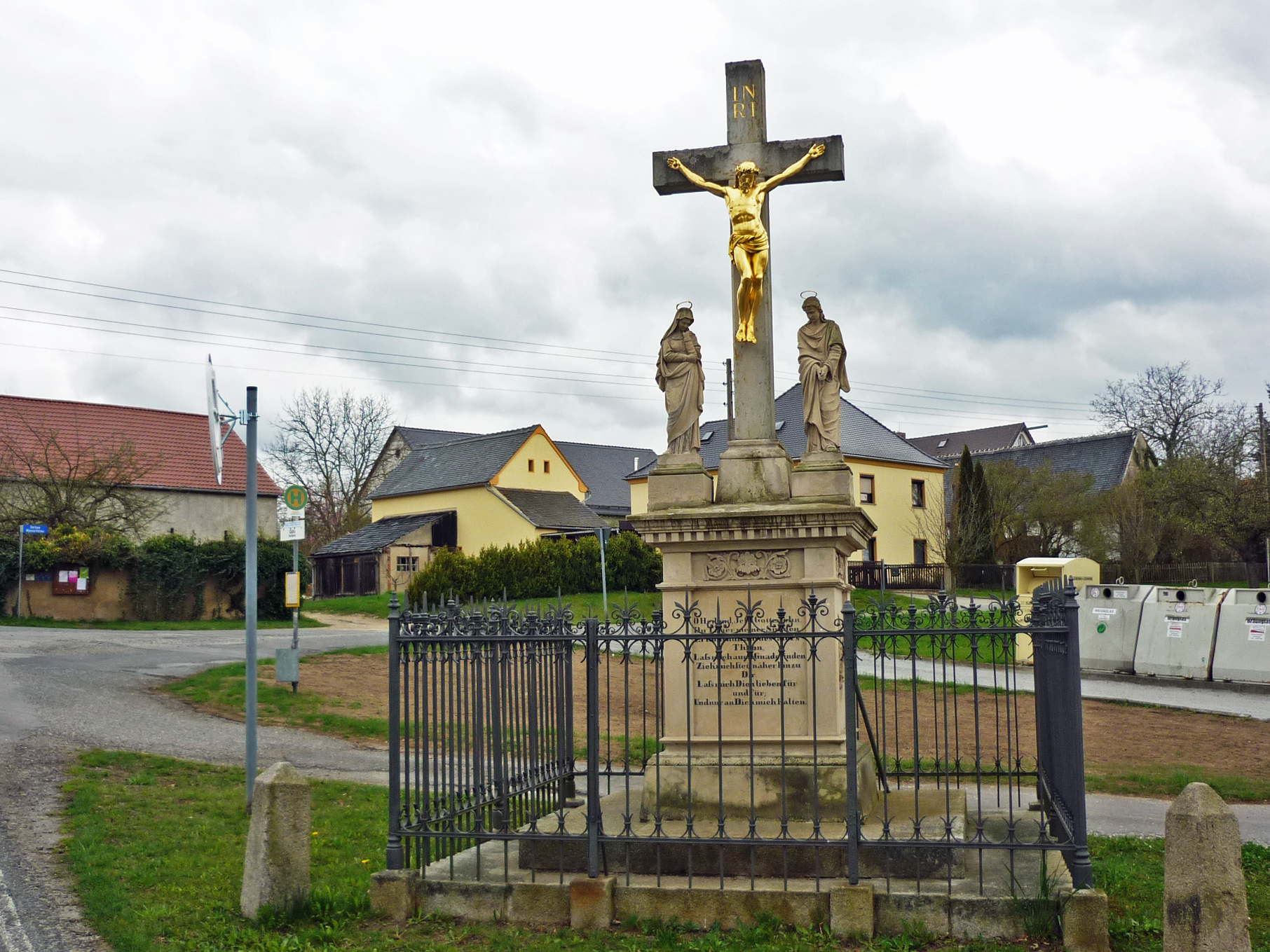 Wegkreuz in Cölln (Radibor), Dorfaue Hornjoserbsce: Swjaty křiž z němskim napisom na Wjesnej łučinje w Chelnje